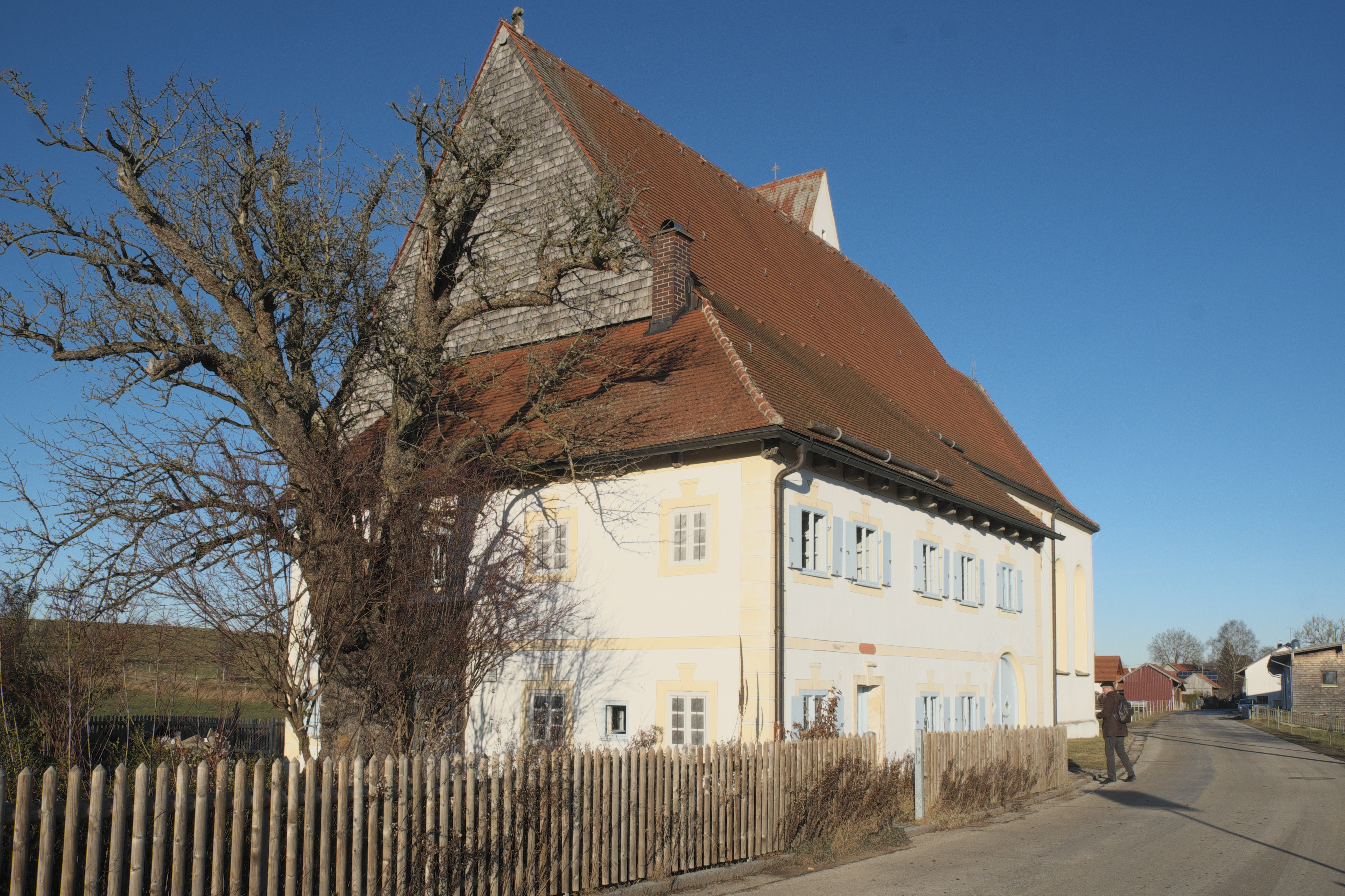 Ehemalige Wallfahrtskirche, heute katholische Filialkirche St. Anna in Burggen im oberbayerischen Landkreis Weilheim-Schongau (Bayern/Deutschland), an die Kirche angebaute ehemalige Klause